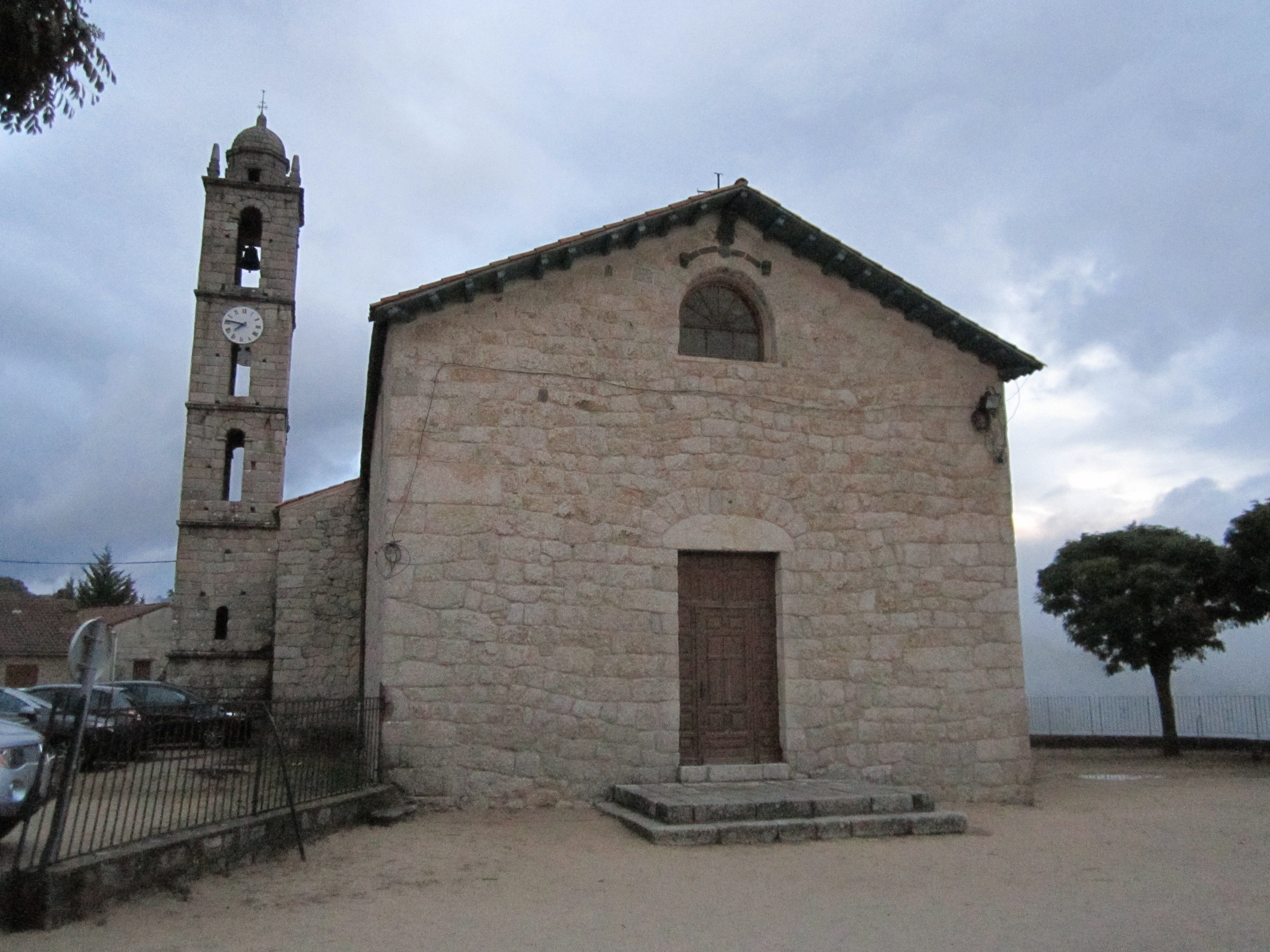 Église Saint-Georges de Quenza, Corse (Classé 1979, Inscrit 1989) .